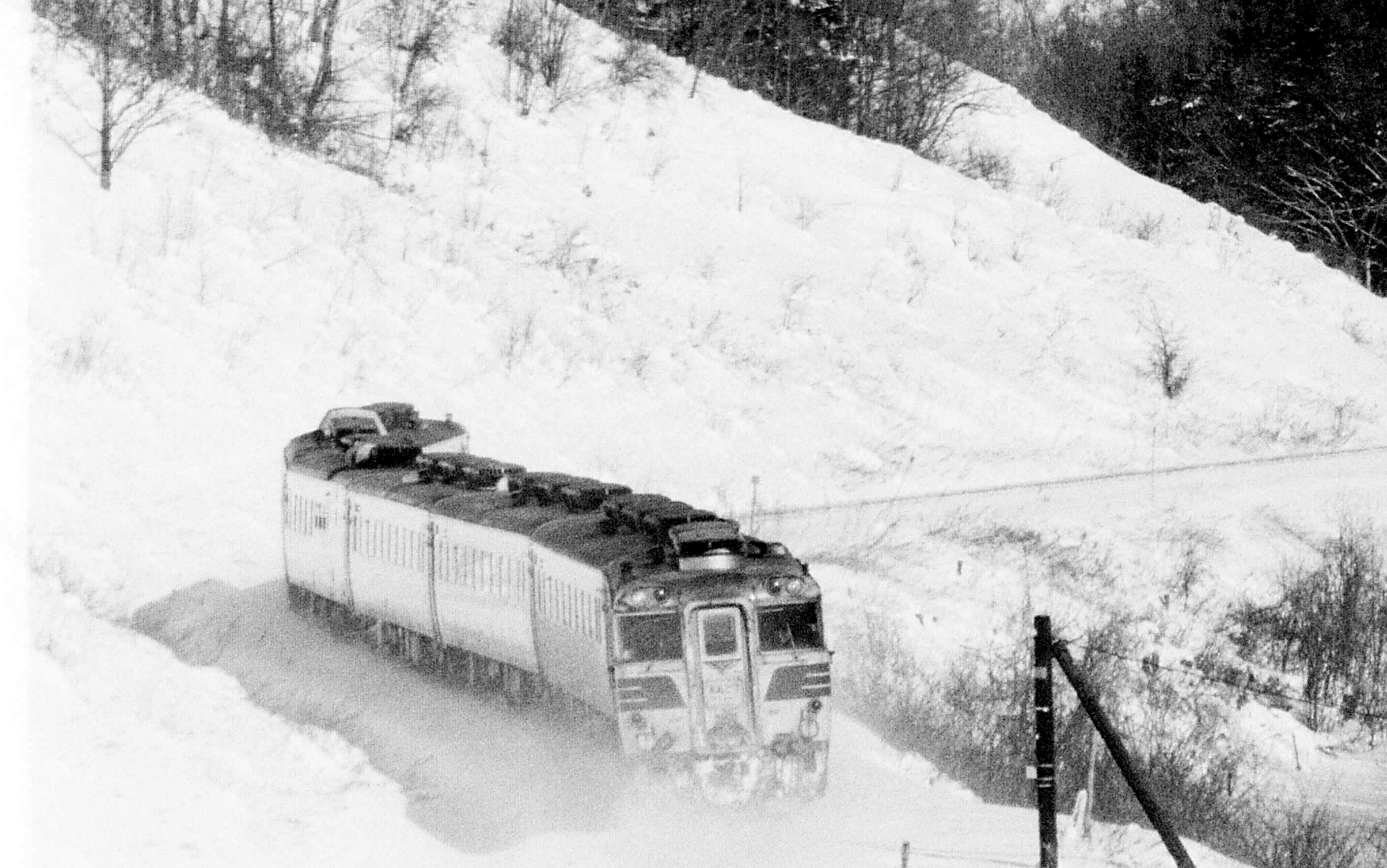 常紋信号場に入る 特急オホーツク 1974